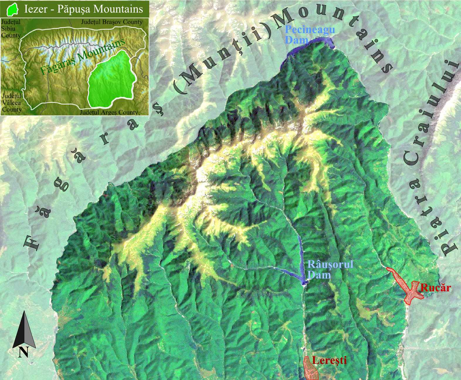 Harta de Localizare Iezer-Păpușa.